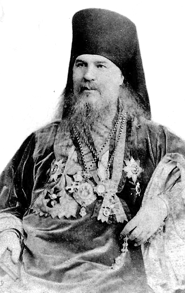 Архиепископ Палладий (Раев). Данное фото атрибуировалось как фото Питирима (Окнова)